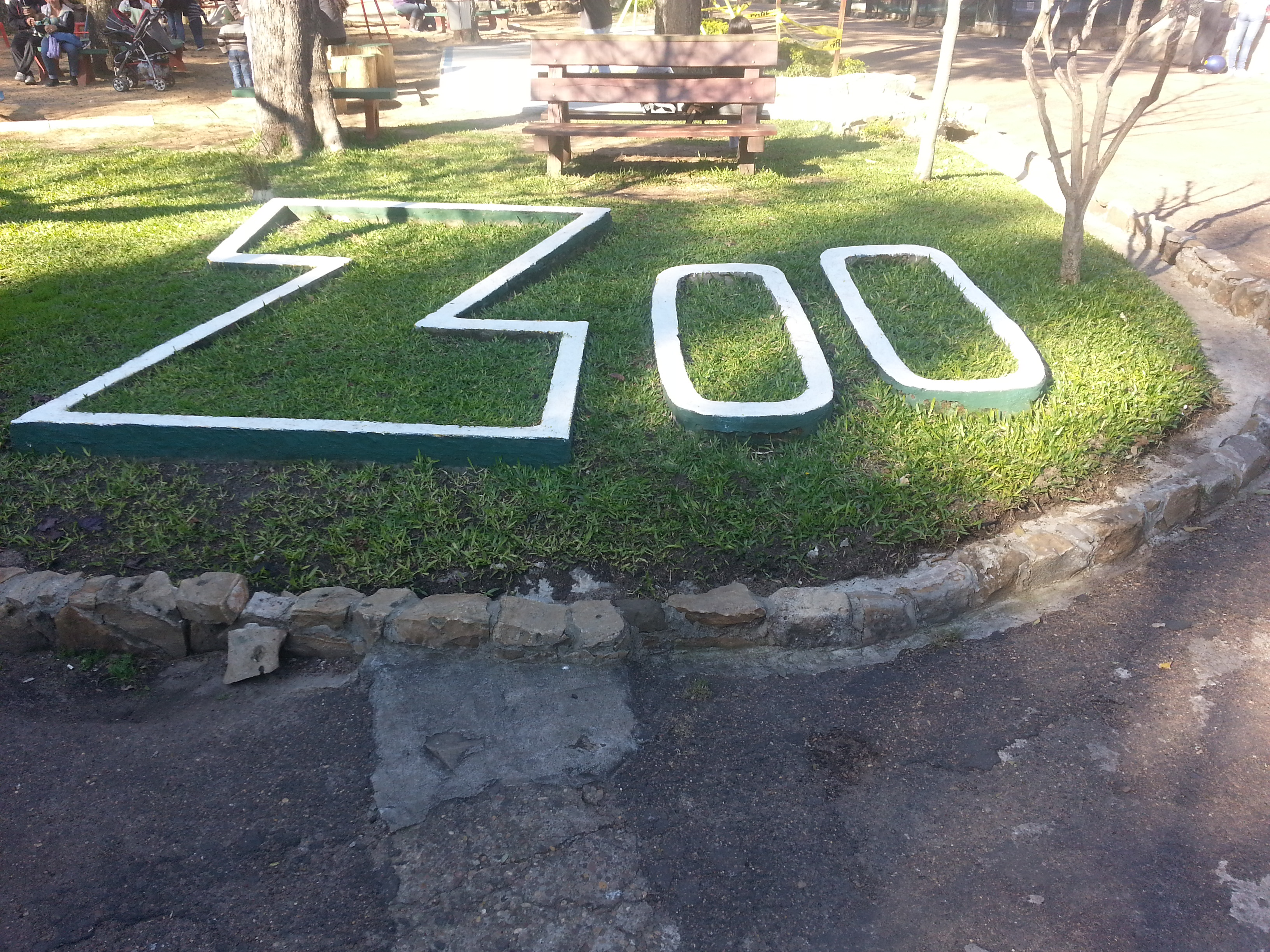 Cantero original